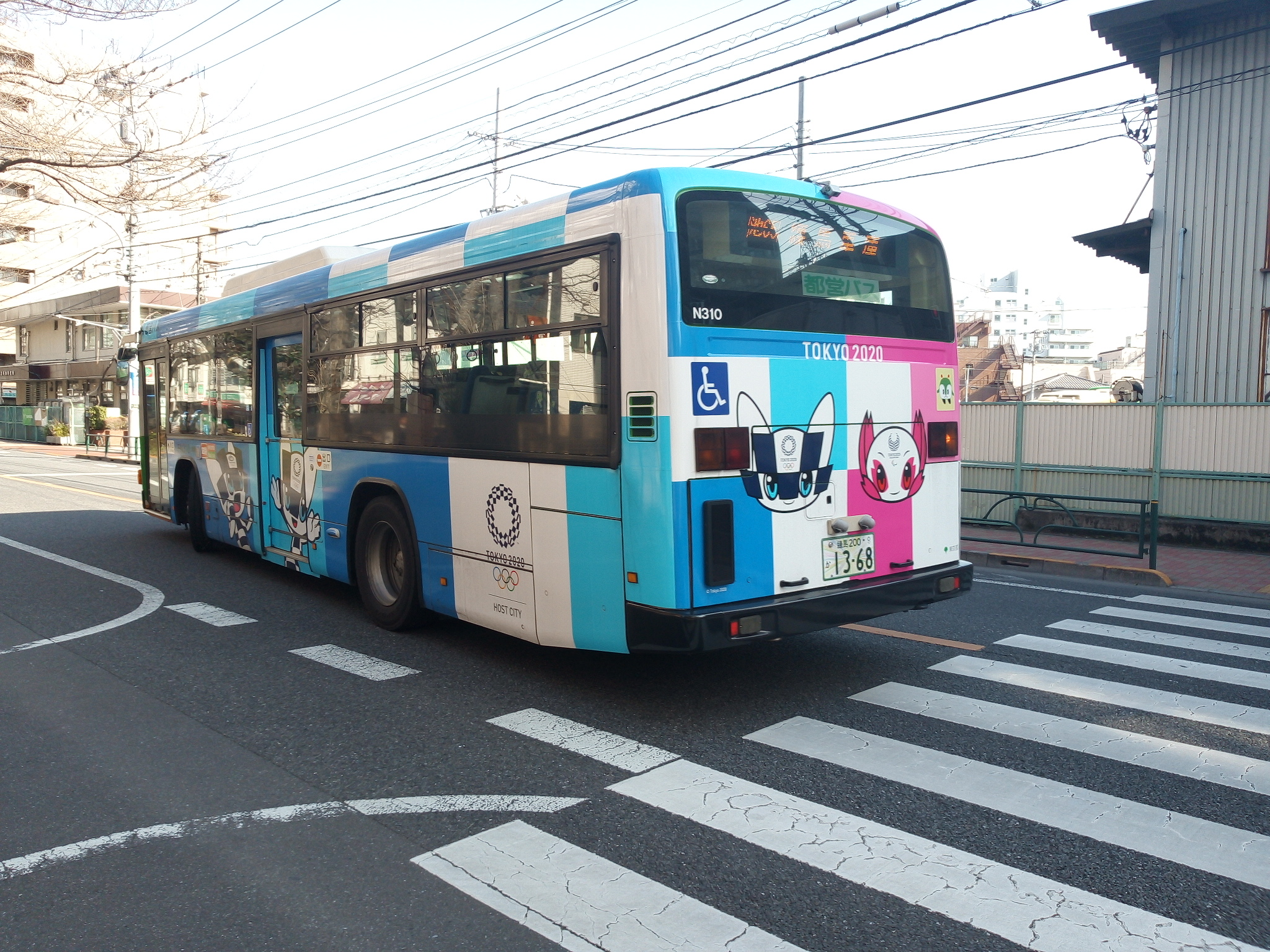 都営バスの東京五輪・パラリンピックマスコットキャラクターラッピング車両。